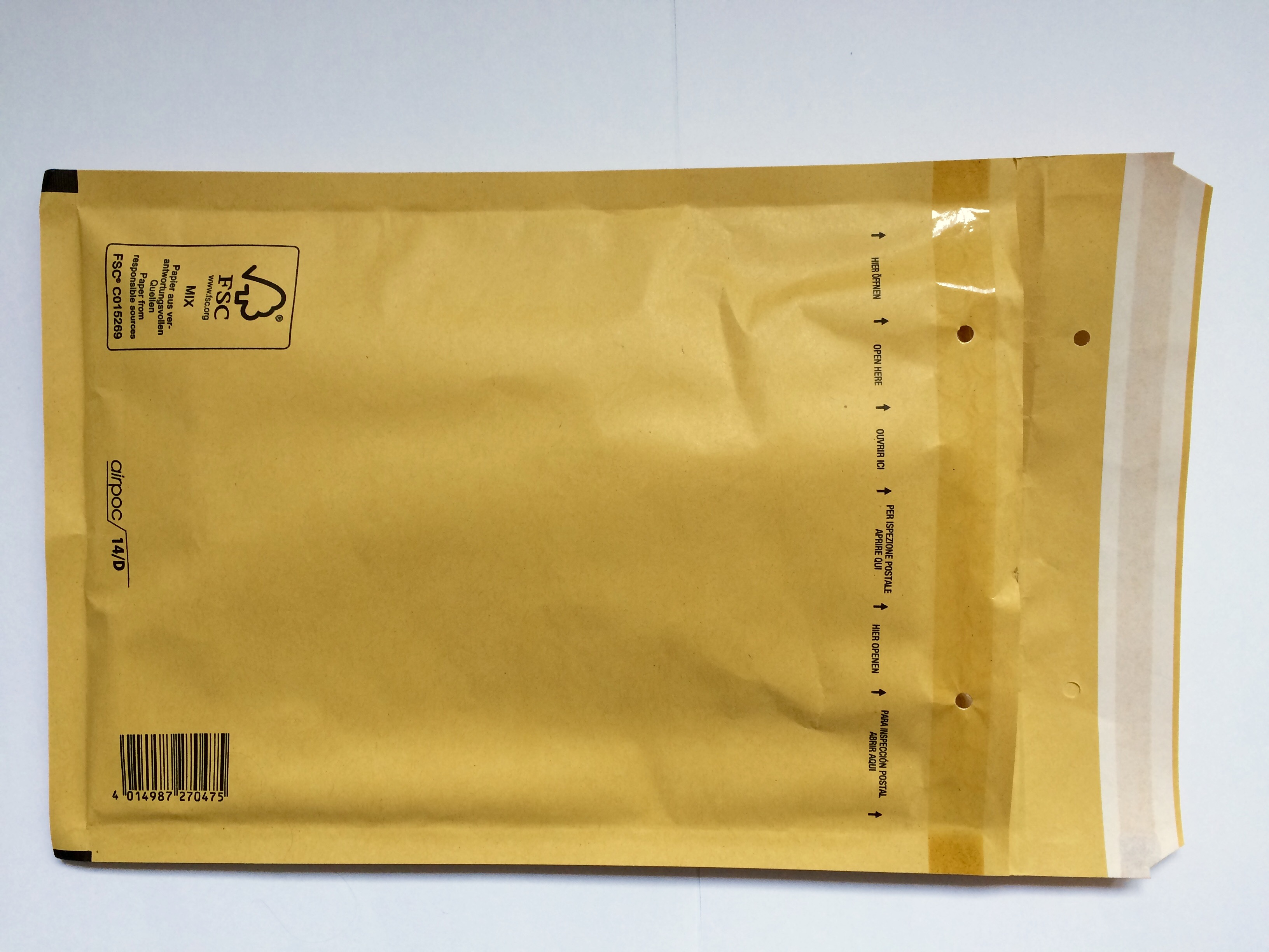 Luftpolstertasche mit Haftklebung ohne Fenster, Größe D